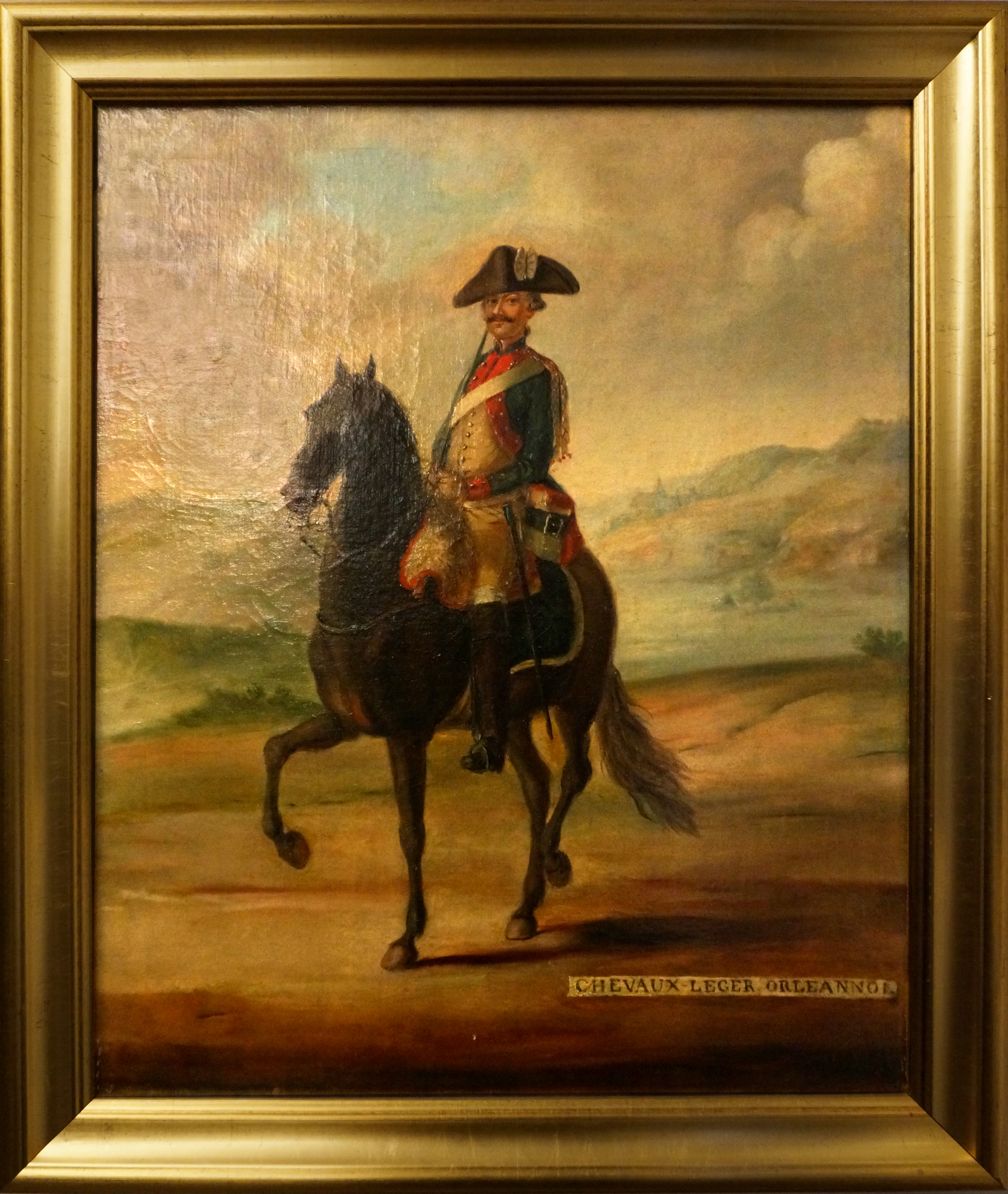 Présenté au Musée de l'Armée.